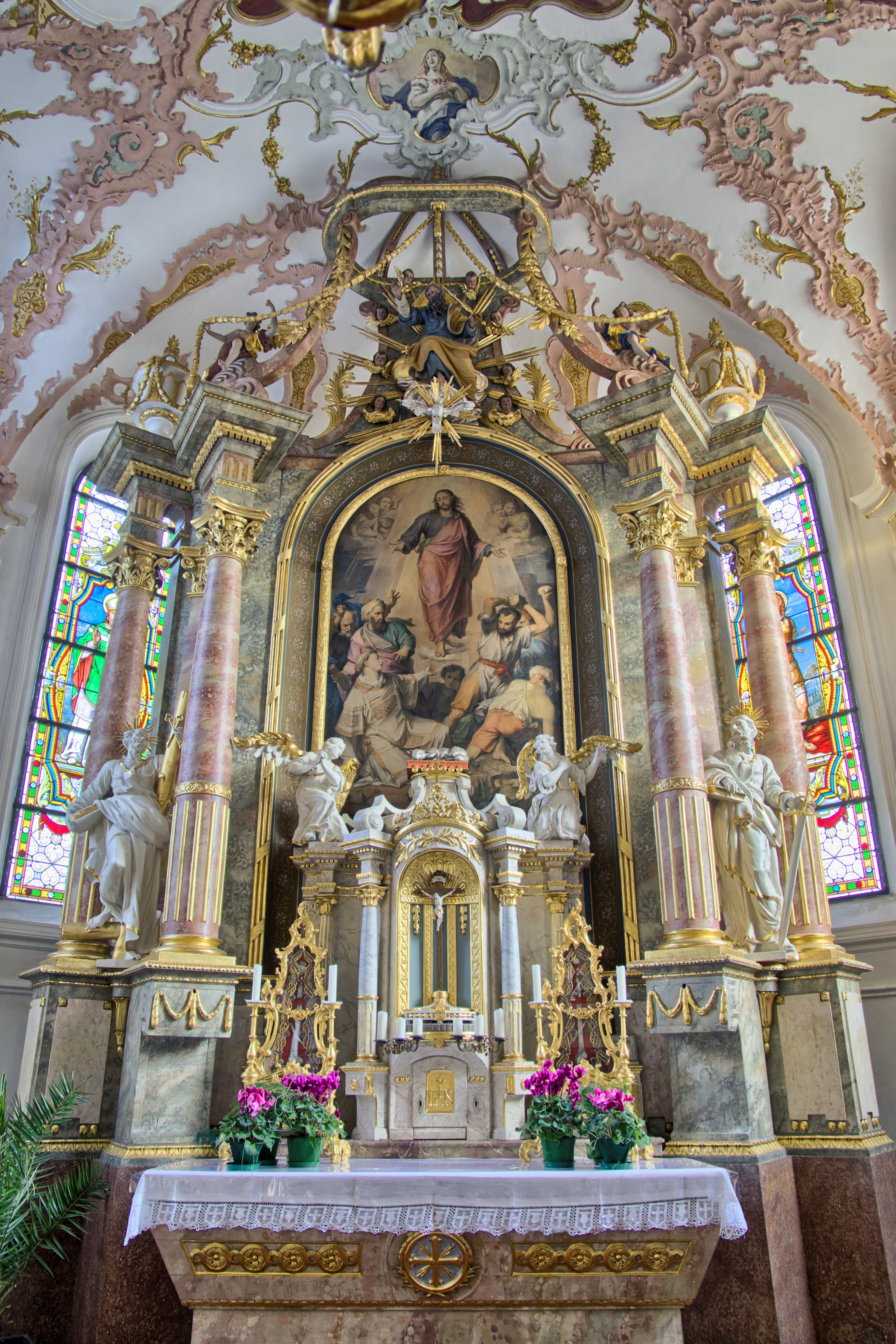 Bilder der Pfarrkirche St. Stephan in Kirchdorf. Die Ortschaft gehört zu Bad Wörishofen